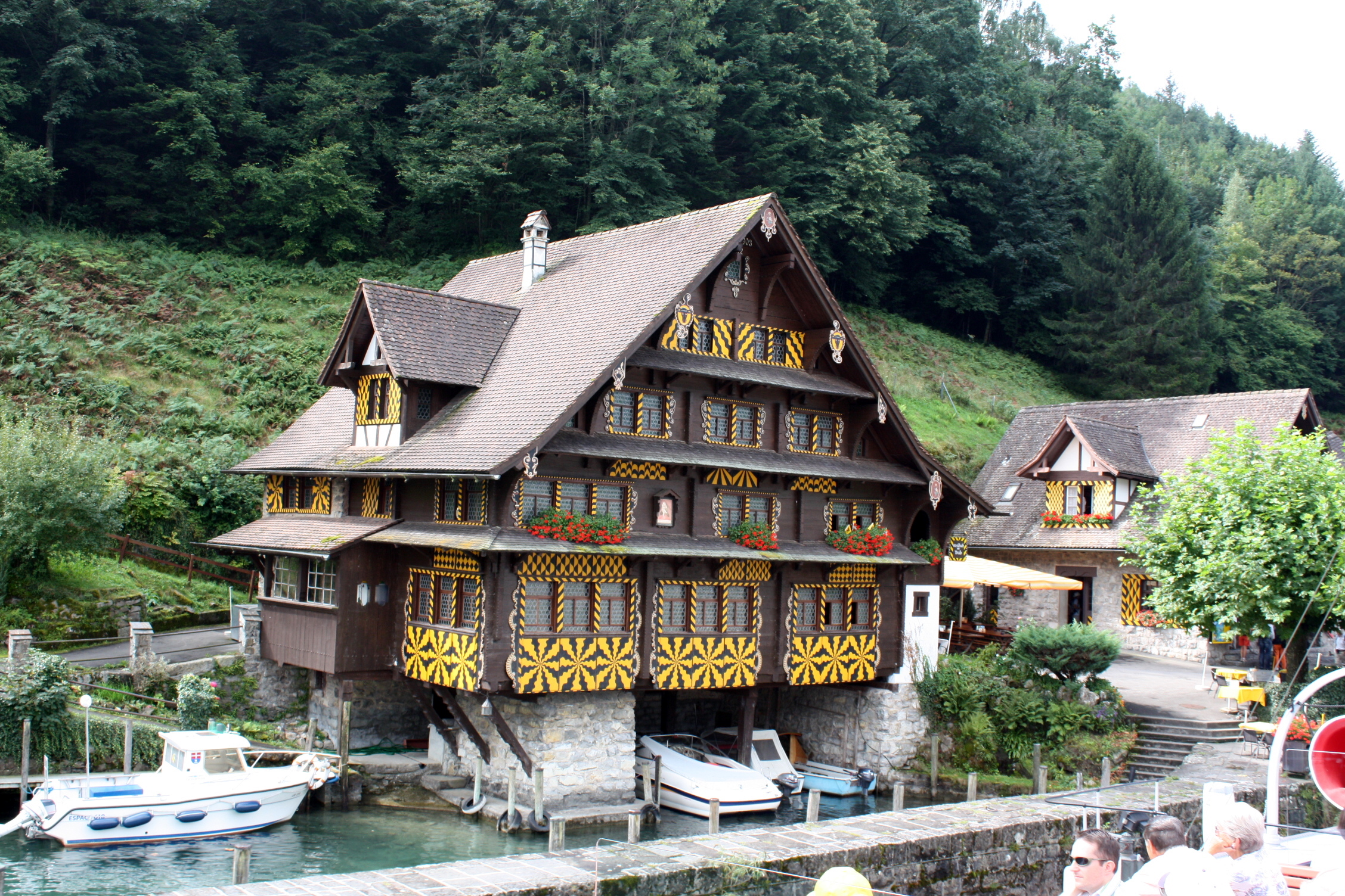 Wirtshaus zur Treib